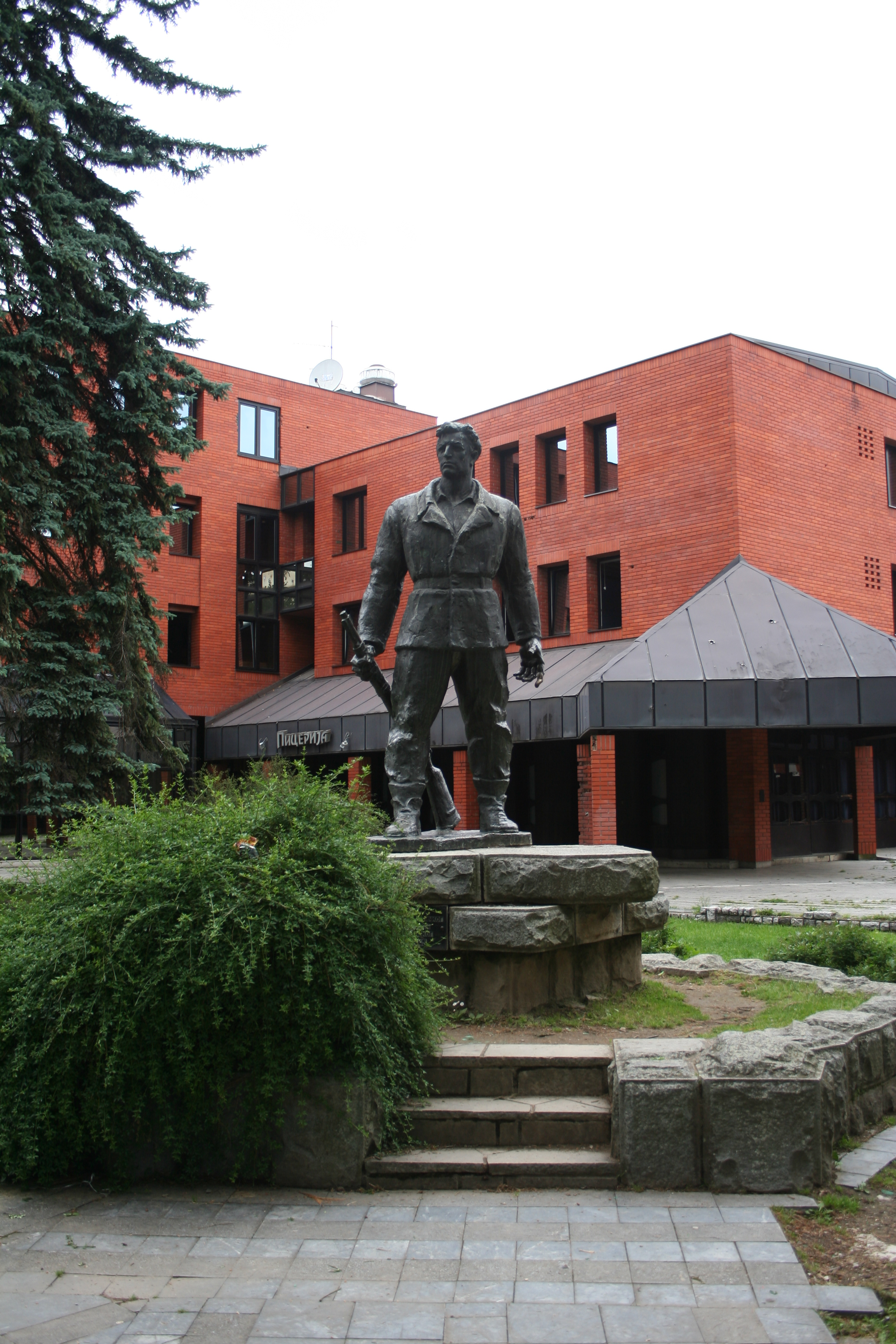 Bajina Bašta u maju 2017.